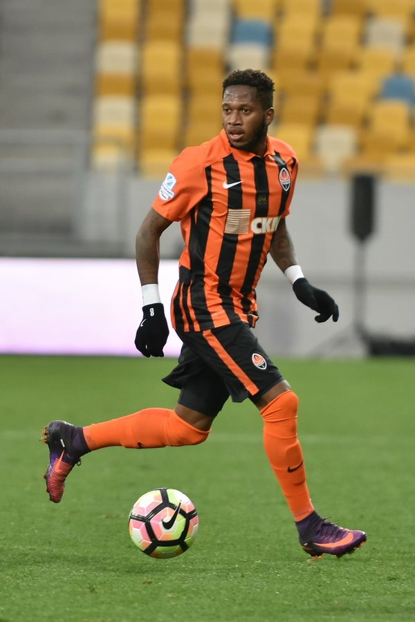 Фред — бразильский футболист